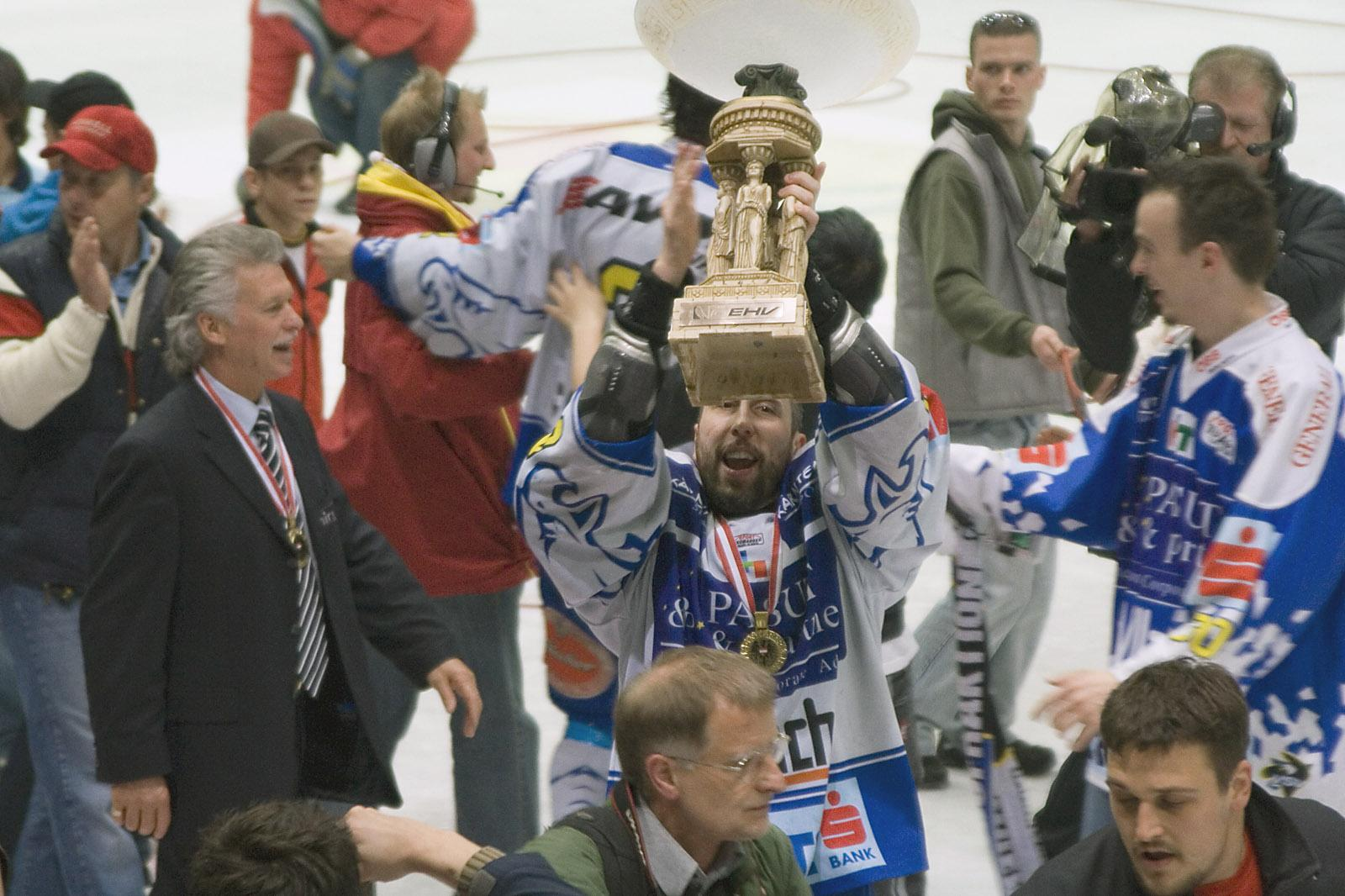 Dany Bousquet (EC VSV), Torschützenkönig der Saison 2005/06 mit dem Meisterpokal.